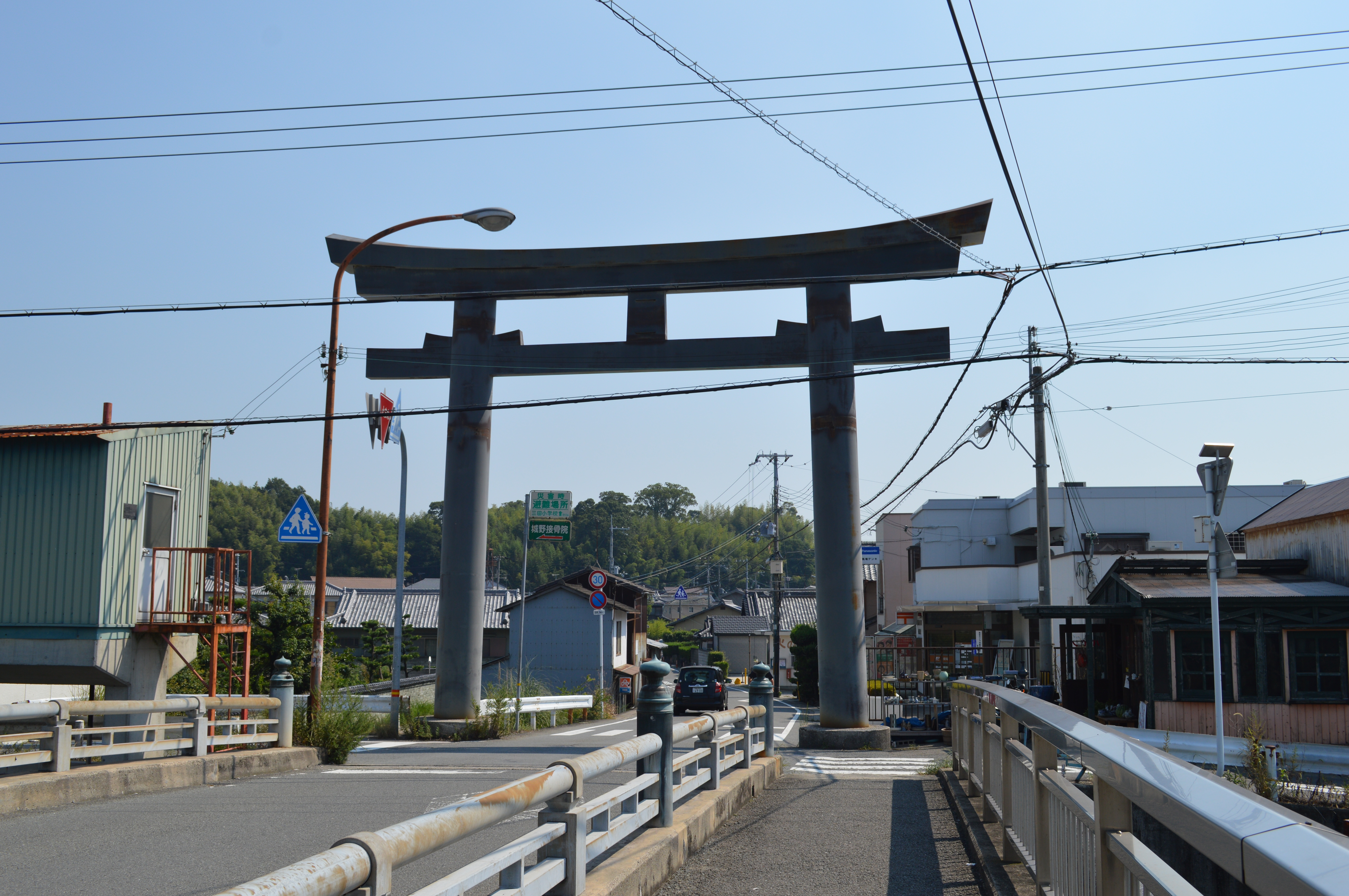 竃山神社 大鳥居